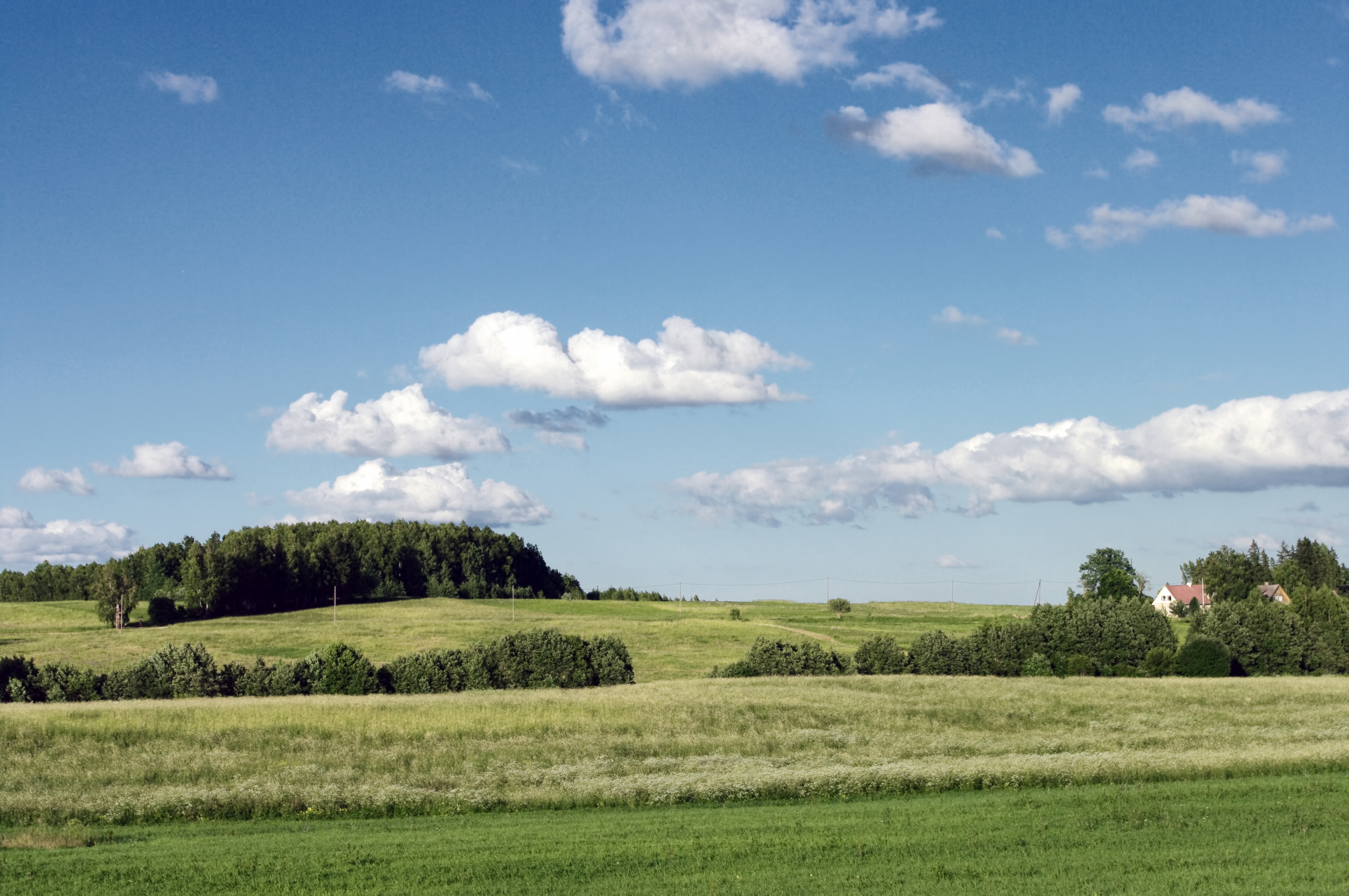 Juula küla, Vooremaa